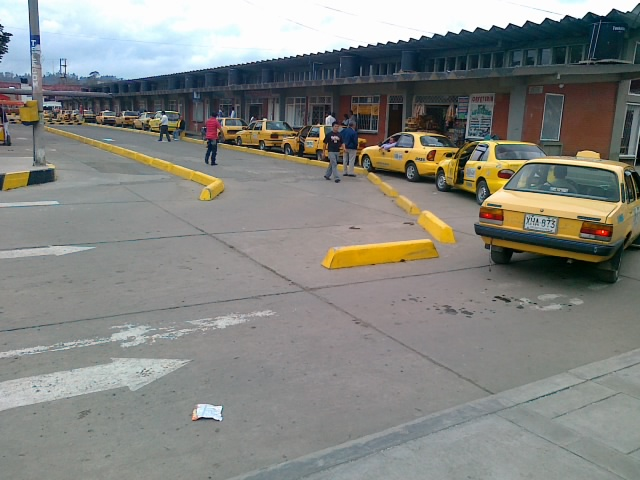 Terminal de transportes de Chiquinquirá, Boyacá, Colombia